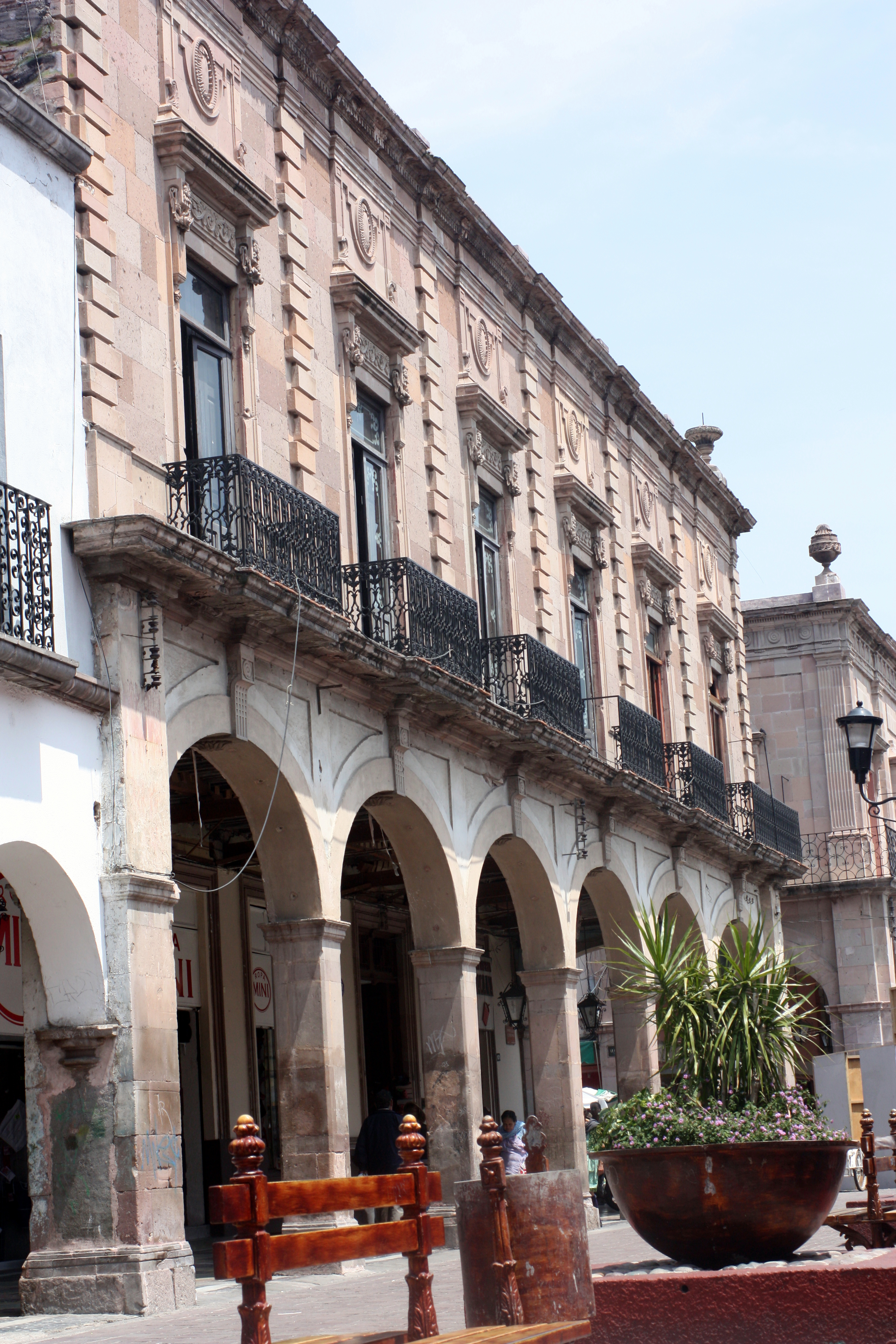 en el corazón de celaya guanajuato